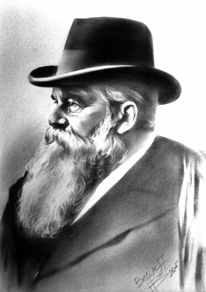 brunow-portraet-zeichnung.jpg